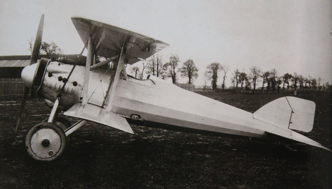 Prototyp Š-4